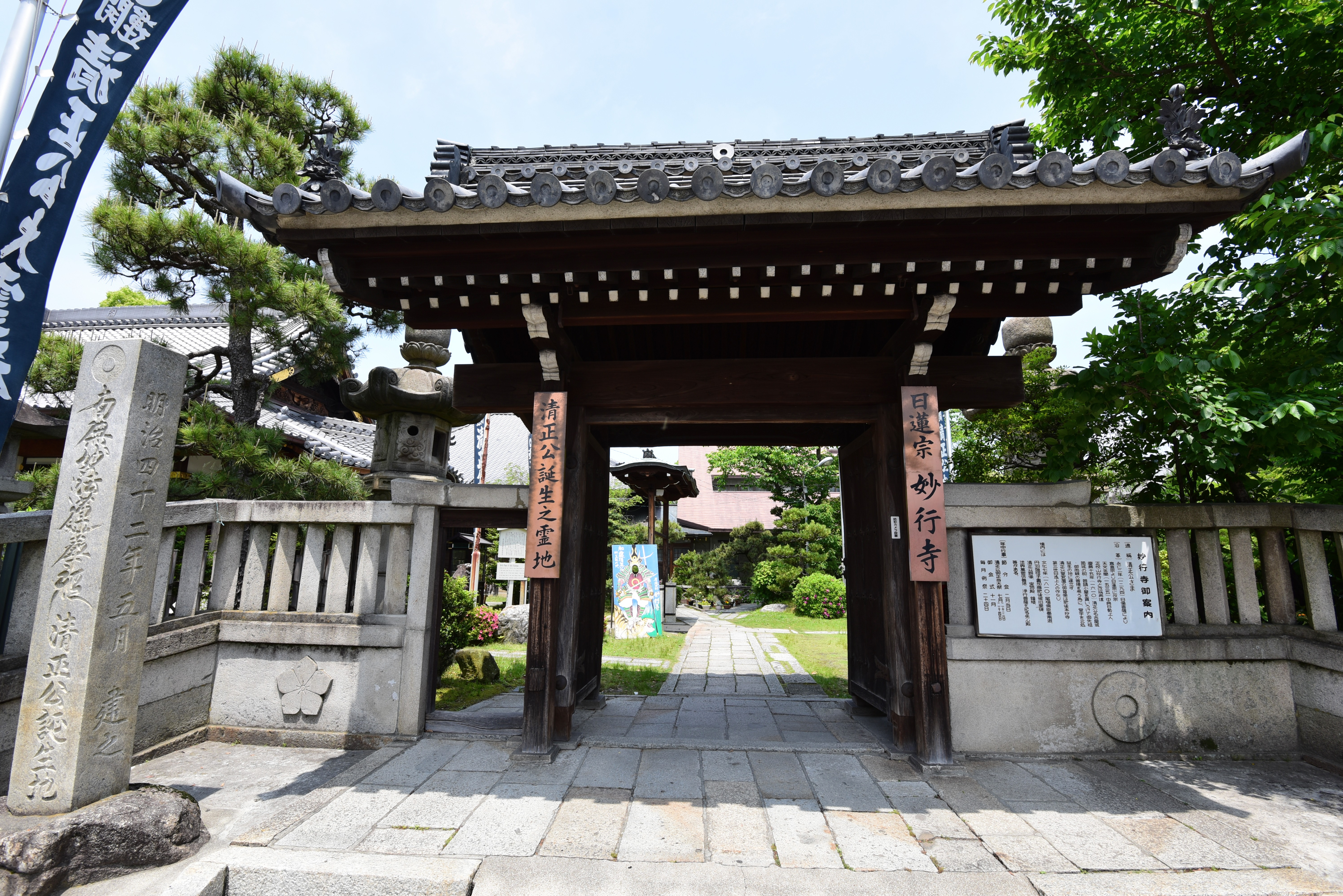 妙行寺の山門